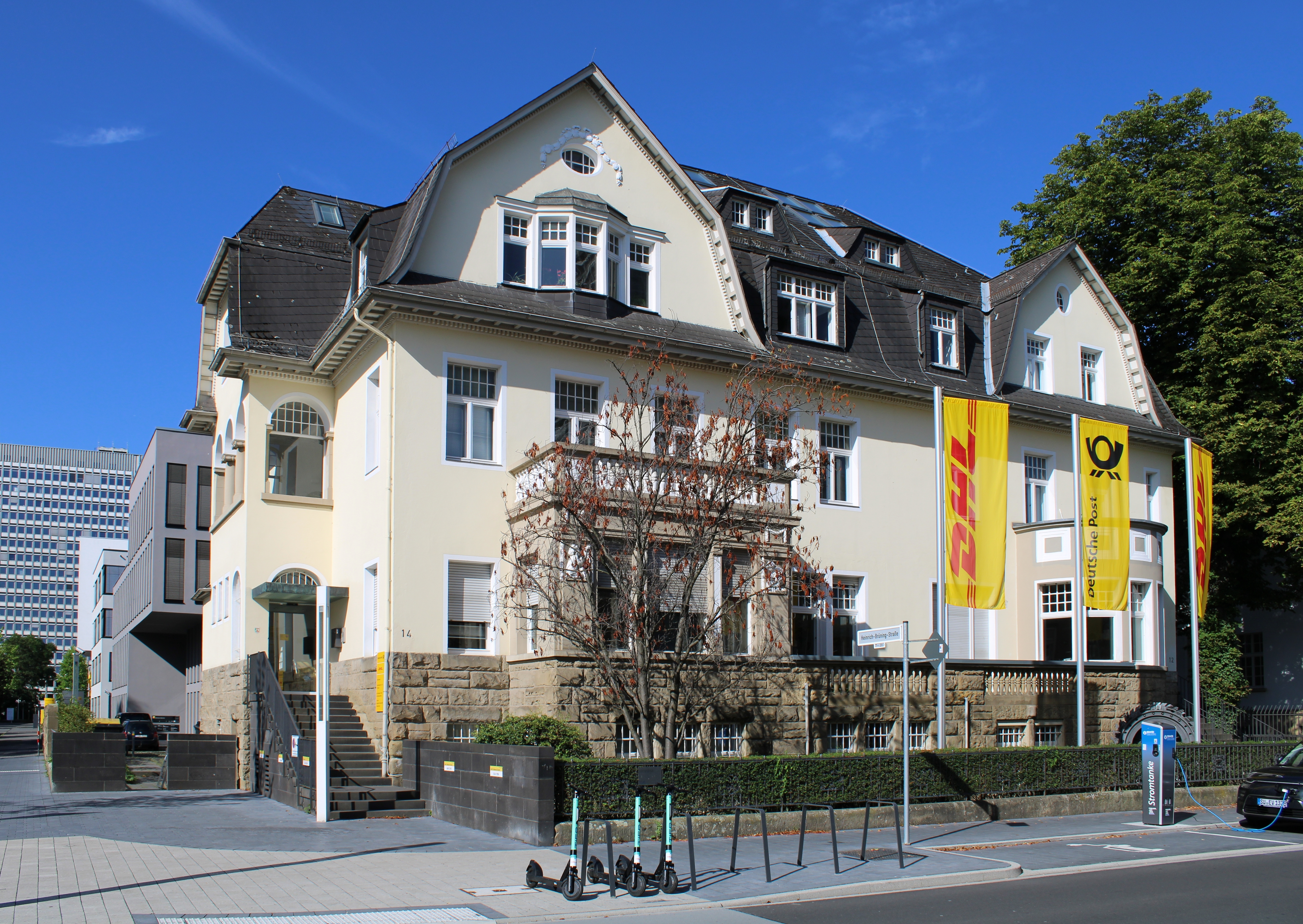 Bonn, Kurt-Schumacher-Str. 12–14: ehemalige (1969–1999) Vertretung des Saarlandes beim Bund. Zum Zeitpunkt der Aufnahme wurde das Gebäude durch die Post AG/DHL genutzt. Das Gebäude ist als Doppelvilla (Kurt-Schumacher-Straße 14/links und 12/rechts) konzipiert.